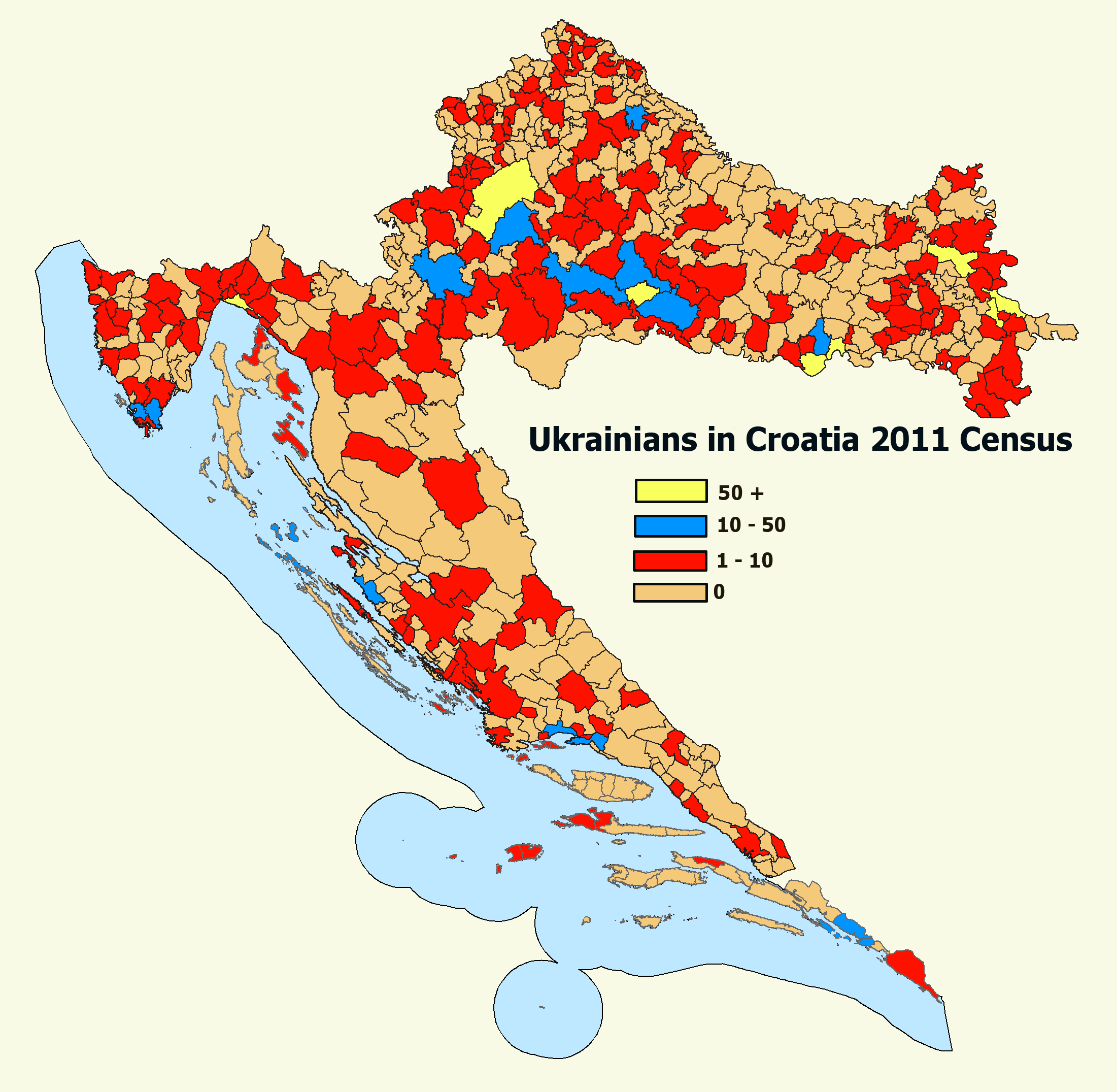 Broj Ukrajinaca po općinama i gradovima u Hrvatskoj popis stanovništva 2011.